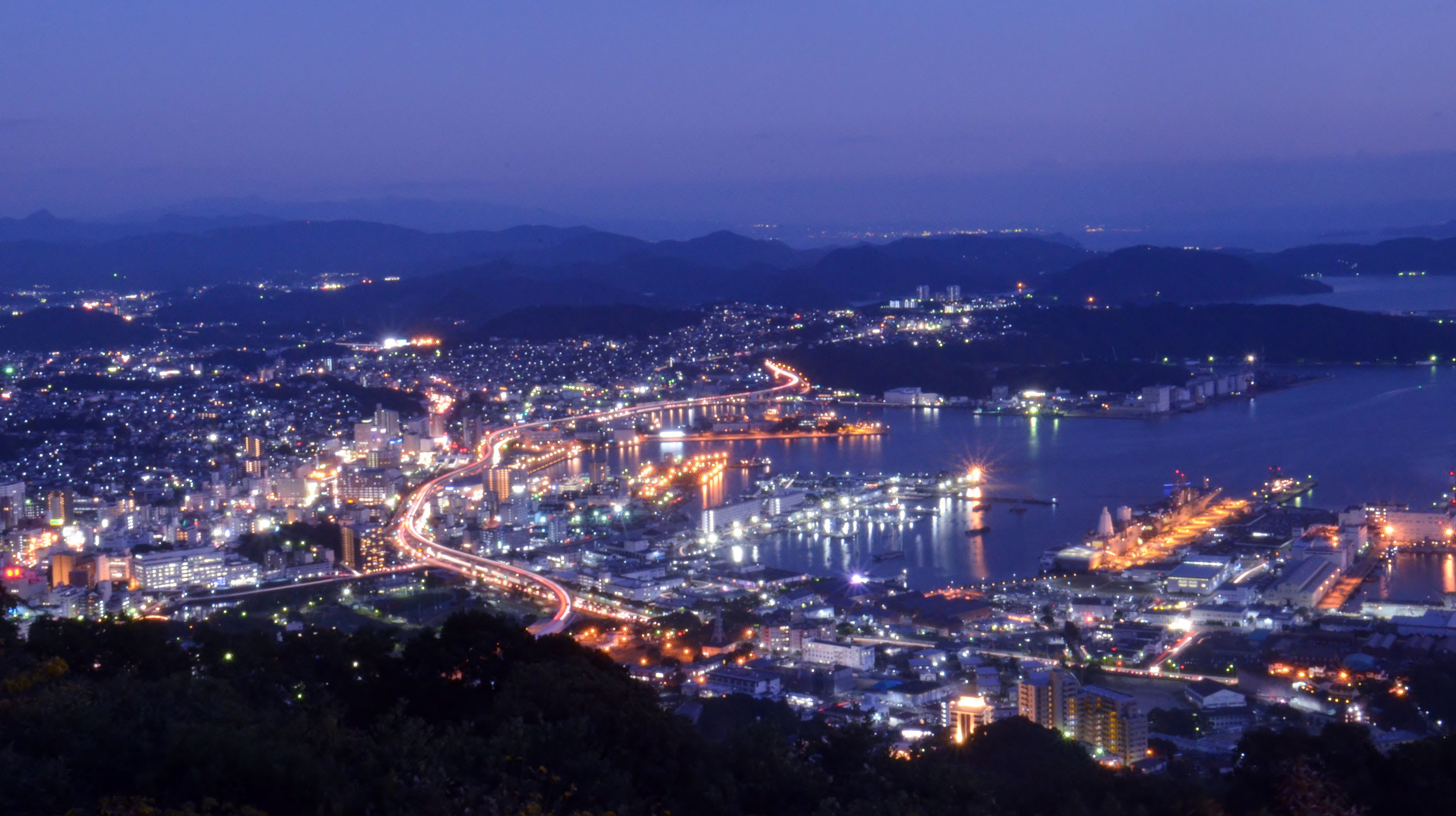 弓張岳展望台から撮影した佐世保市街地